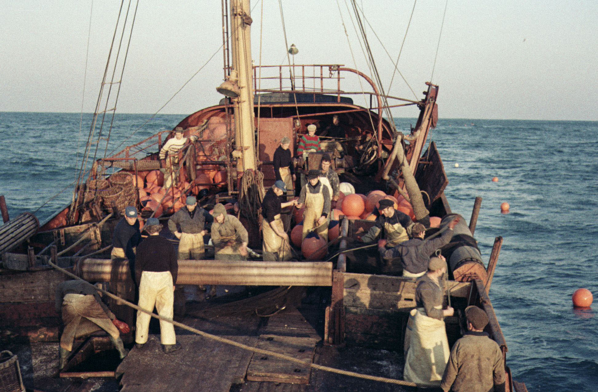 Kombilogger Saxnot SG7 beim Aussetzen des Treibnetzes (Netzfleet)